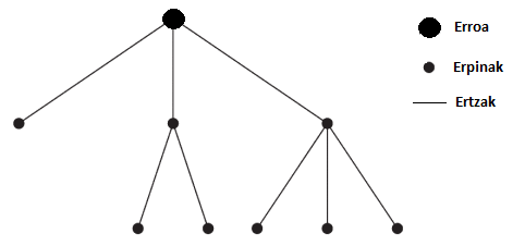 1.go irudia; Zuhaitz diagramaren ikurrak